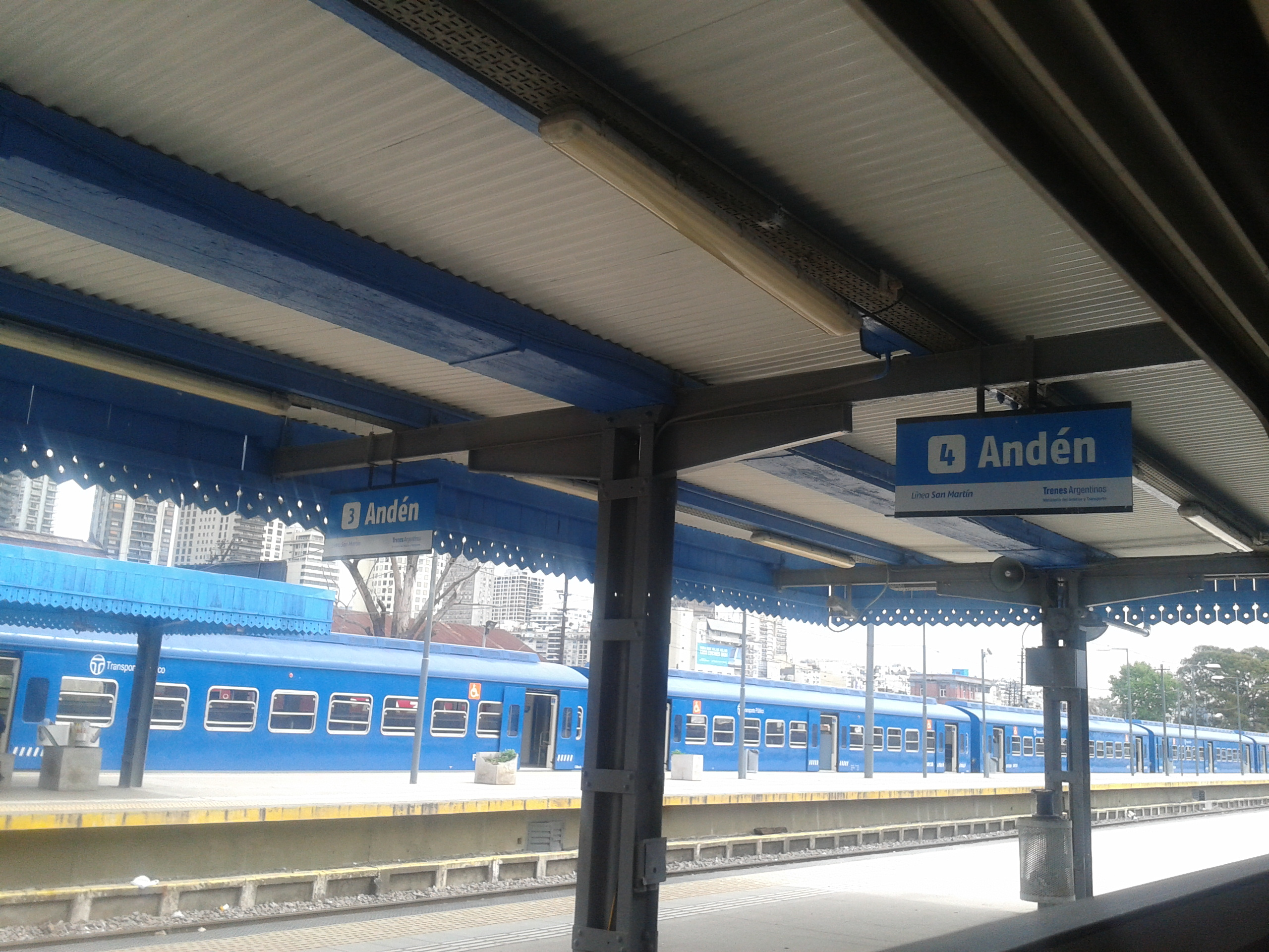 Nomencladores